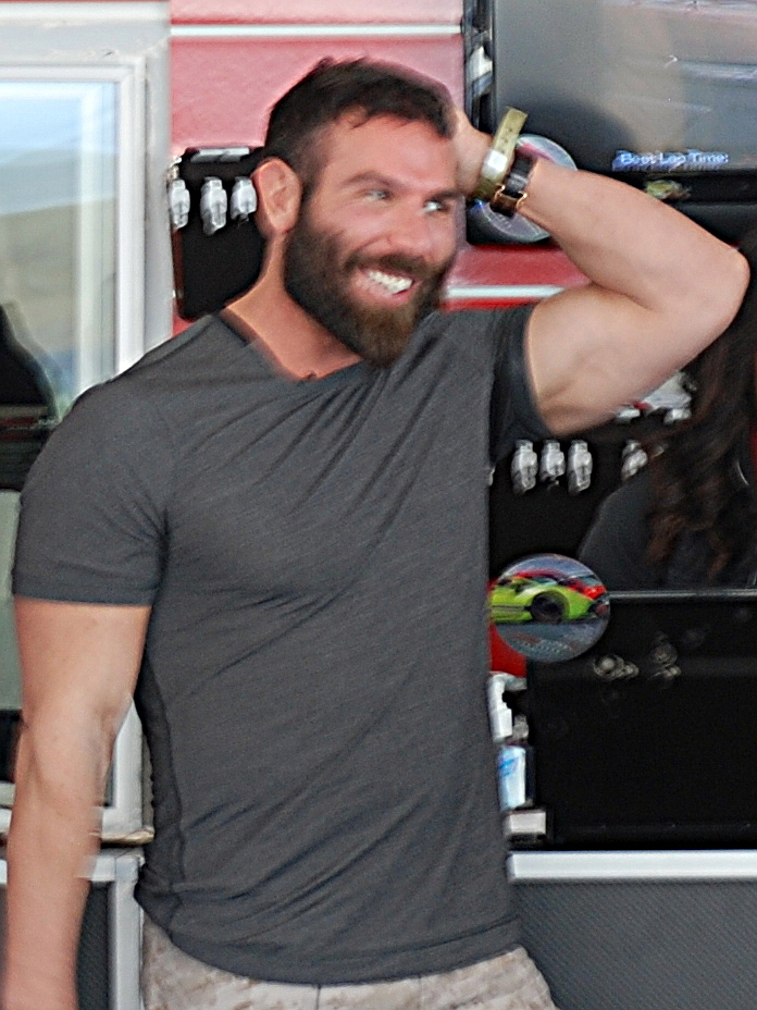 Dan Bilzerian 2013 in Las Vegas